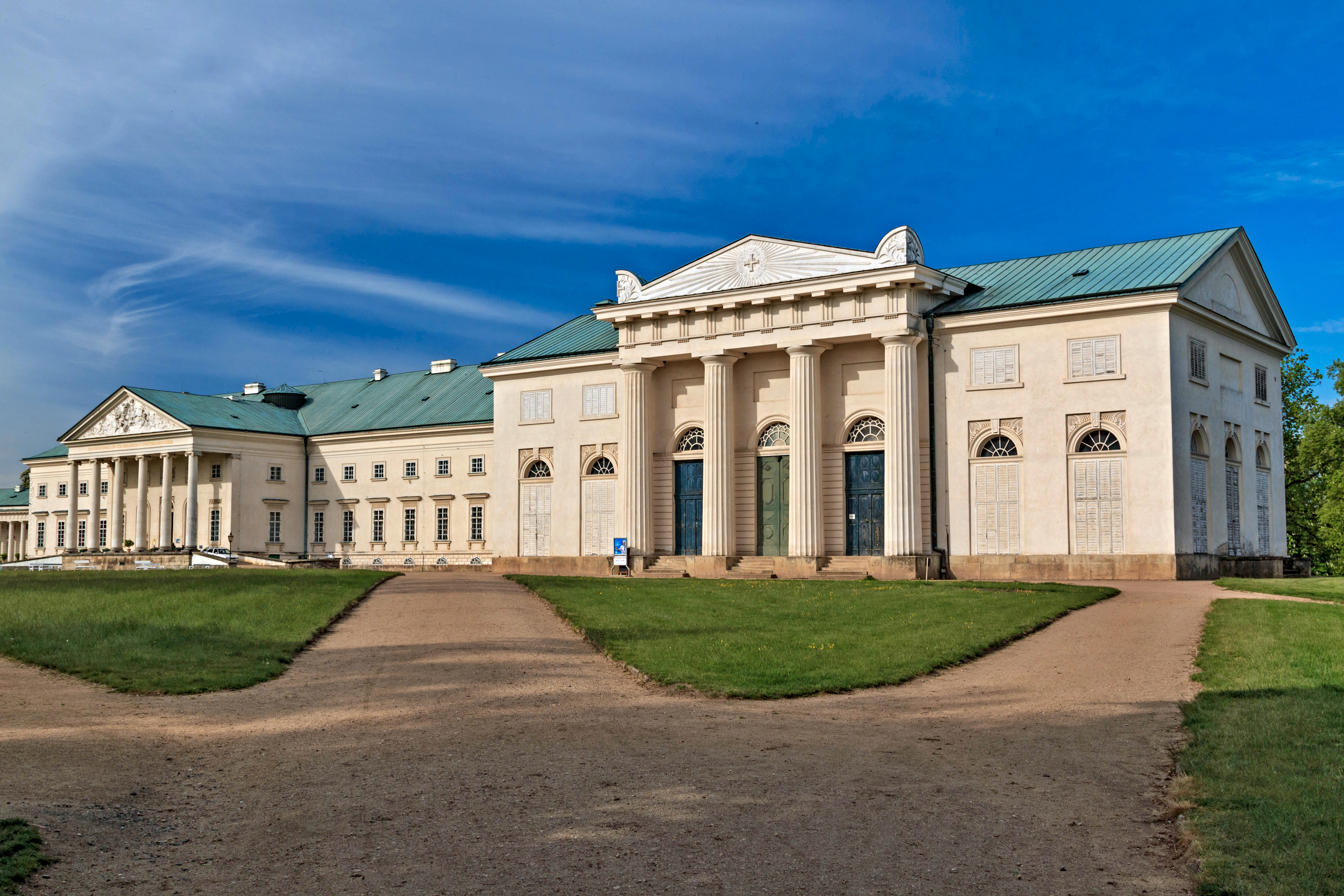 Zámek Kačina, Svatý Mikuláš 51, Svatý Mikuláš (okres Kutná Hora).